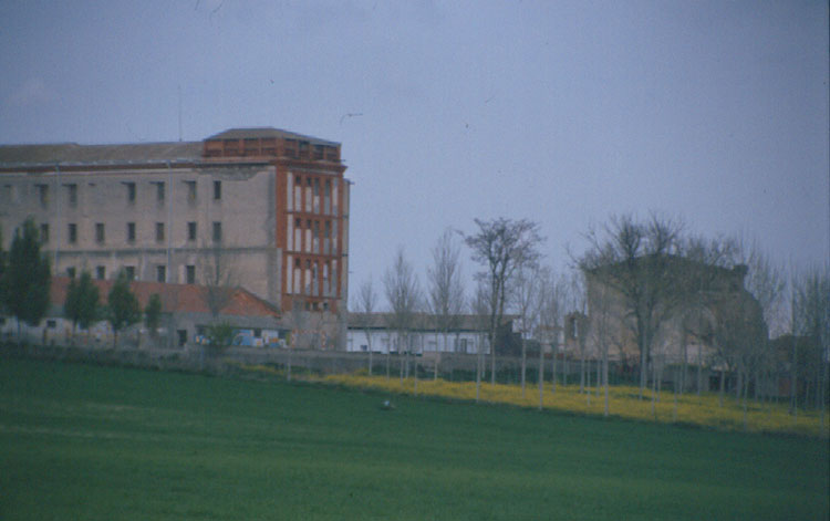 Convento de la Mejorada - Olmedo (Valladolid) - Diapositiva 48 x 48 Color